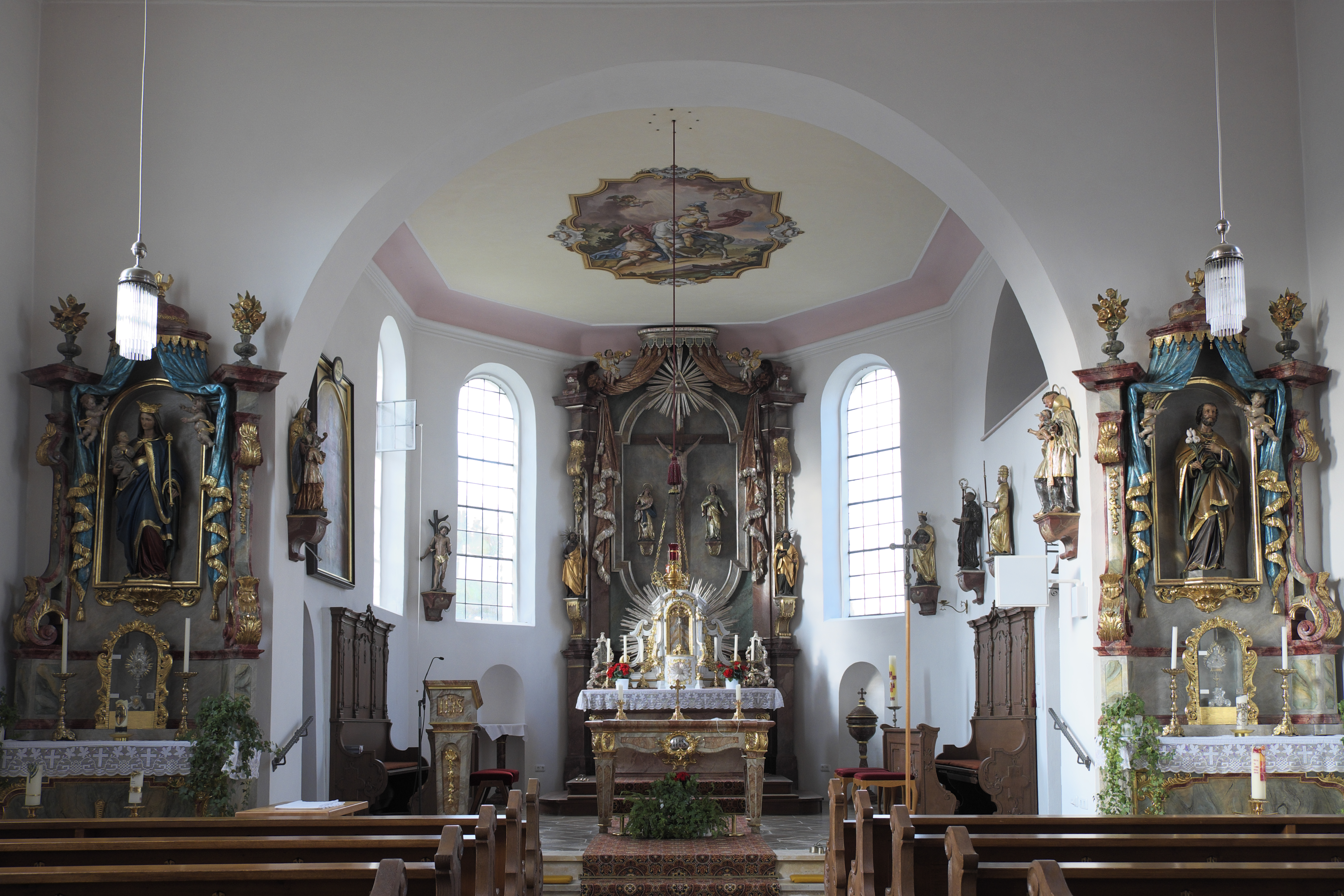 Katholische Pfarrkirche St. Martin in Heretsried im Landkreis Augsburg (Bayern/Deutschland), Innenraum